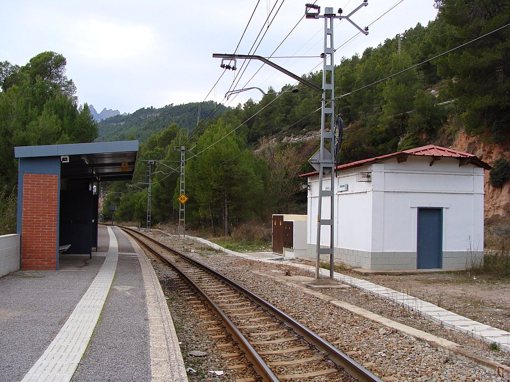 Vista general de l'estació de Castellbell i el Vilar dels FGC. Vista general de la estación de Castellbell i el Vilar de los FGC.